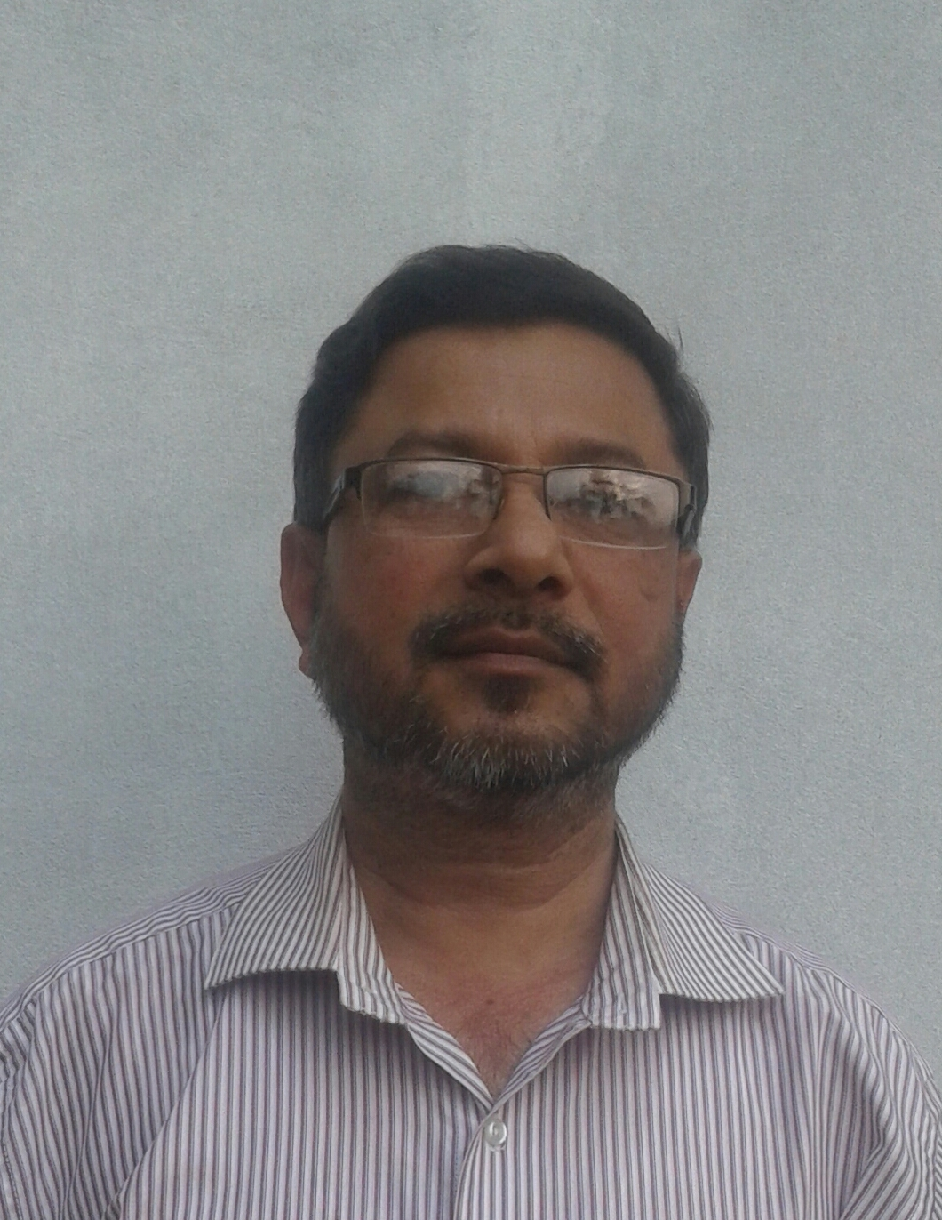 মির্জা মোফাজ্জল ইসলাম